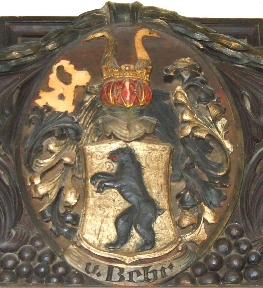 Wappen der von Behr Vagatz/Schmoldow im Kreishaus Greifswald